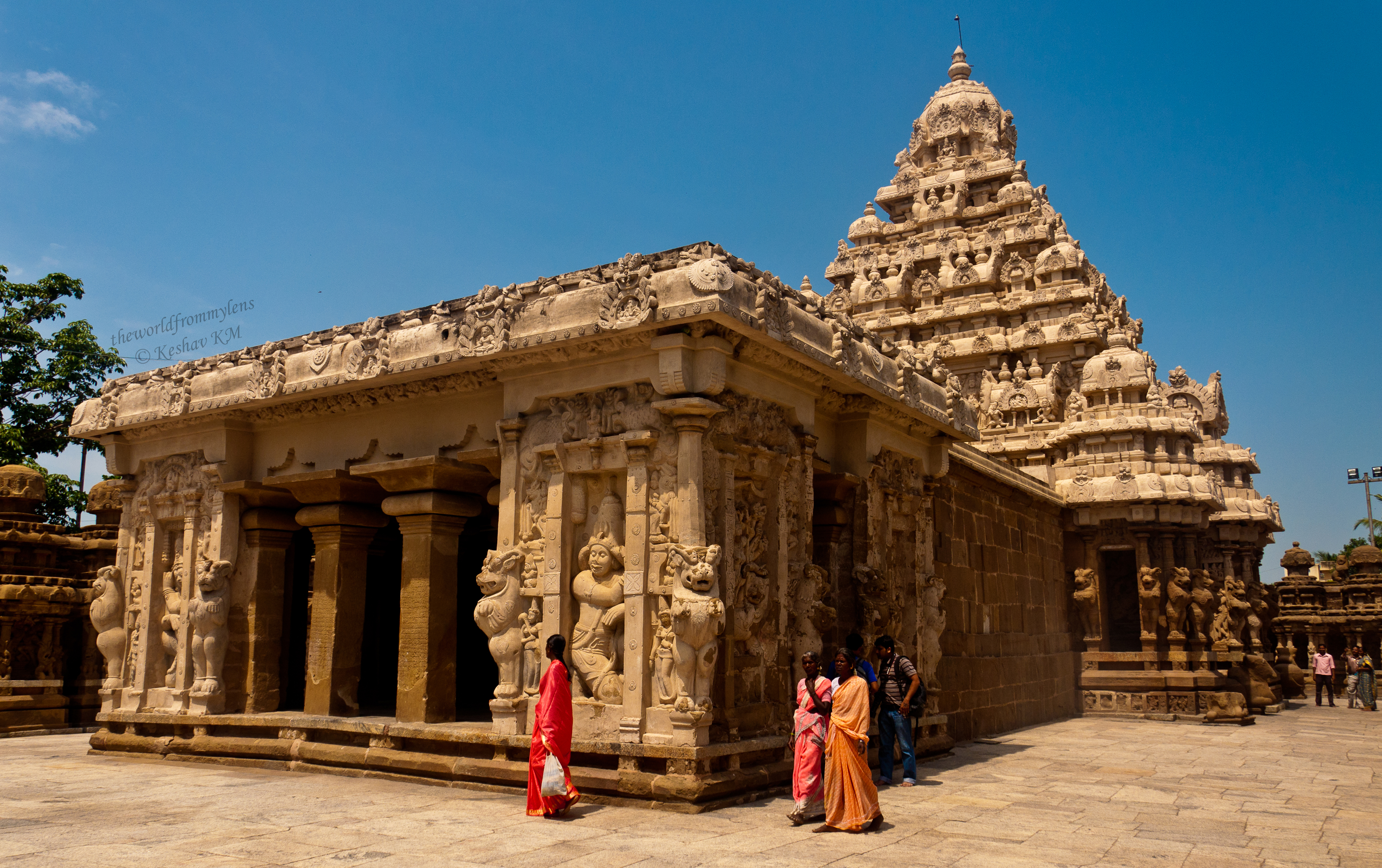 Kailasanathar temple, Kanchipuram